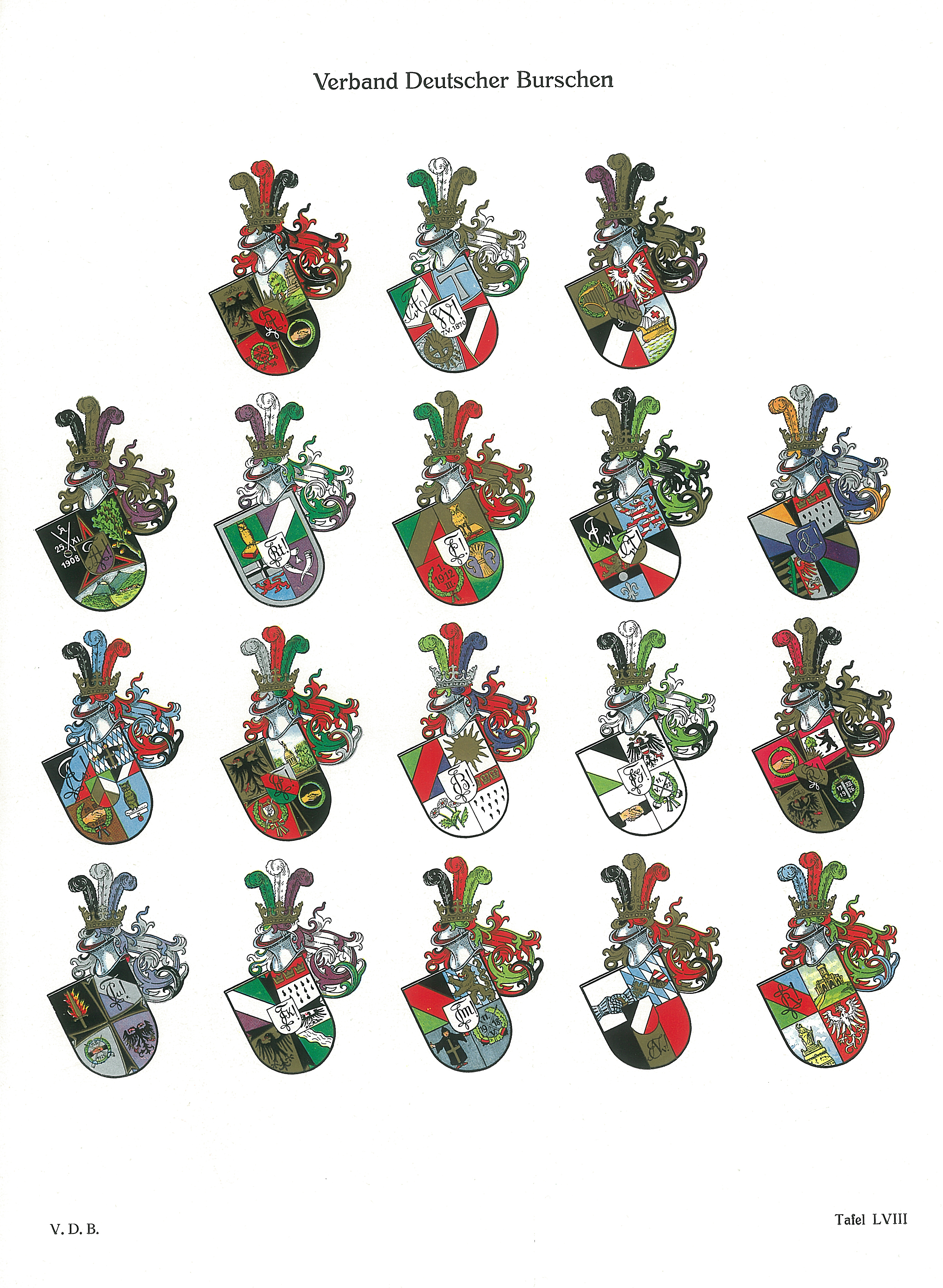 Bünde im Verband Deutscher Burschen.